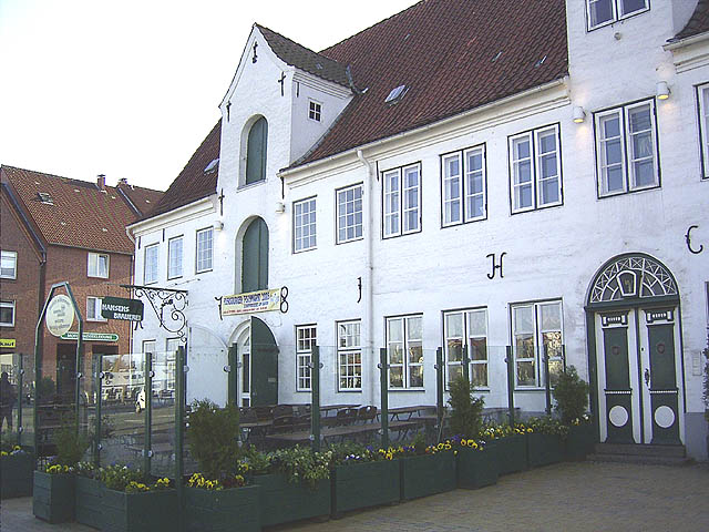 Beschreibung und Quelle Beschreibung: Seitliche Frontansicht der Hansens Brauerei in Flensburg, ehemaliges Fabrikationsgebäude der Firma Sonnberg-Rum Quelle: selbst fotografiert Fotograf: Kasperky Datum: 28.04.2005